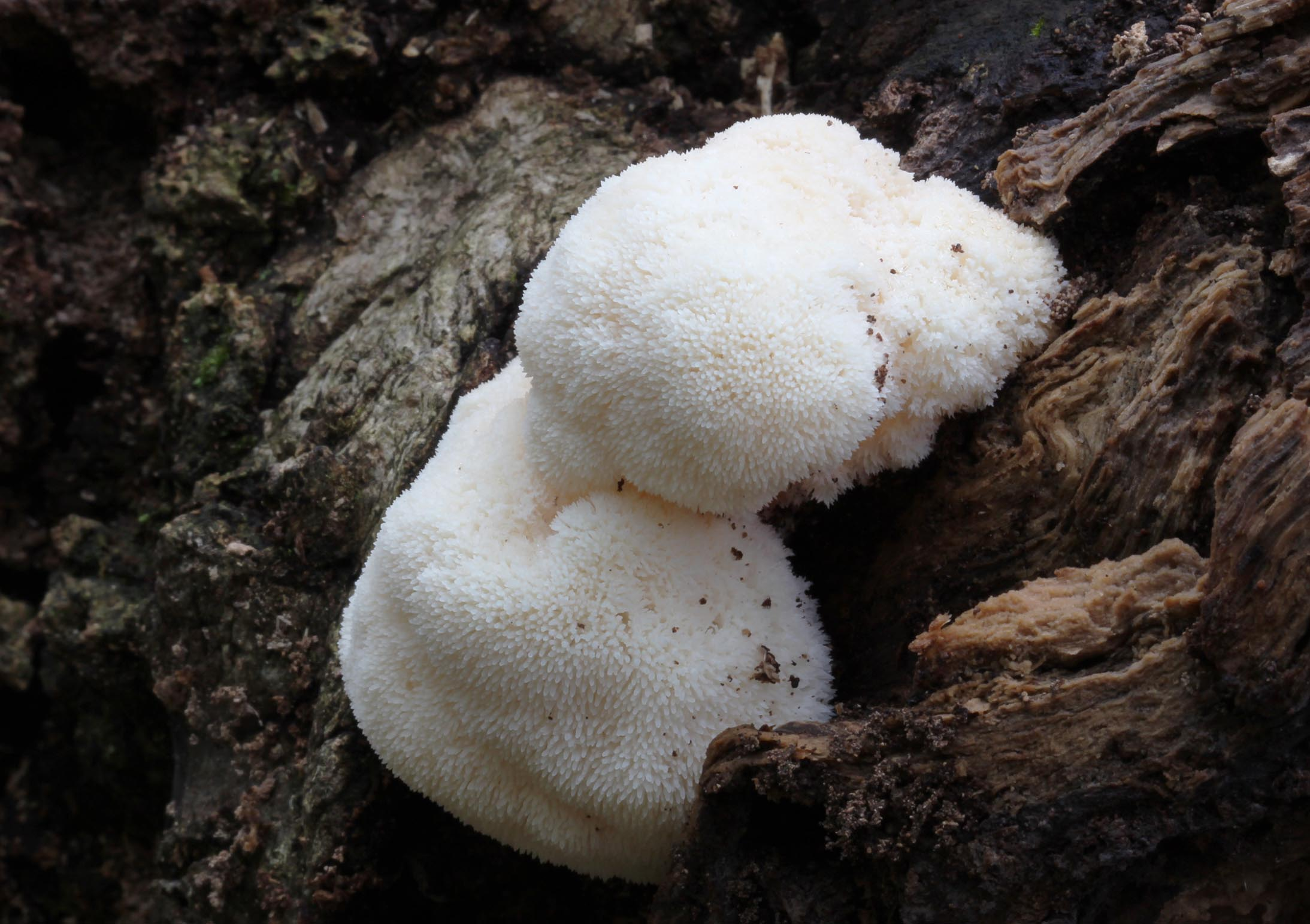 Hericium erinaceus (Bull.) Pers.